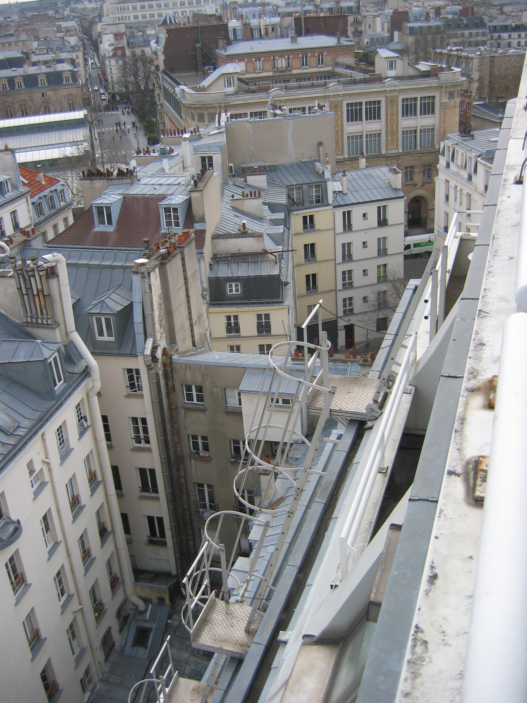 Vue de la terrasse du journal Libération sur le quartier - Journée Portes ouvertes du 15 mars 2014